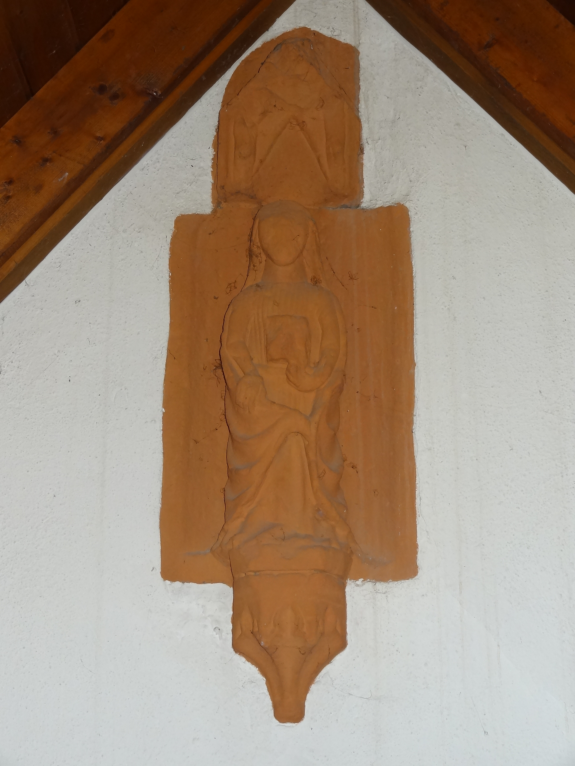 Evangelische Pfarrkirche Ober-Widdersheim